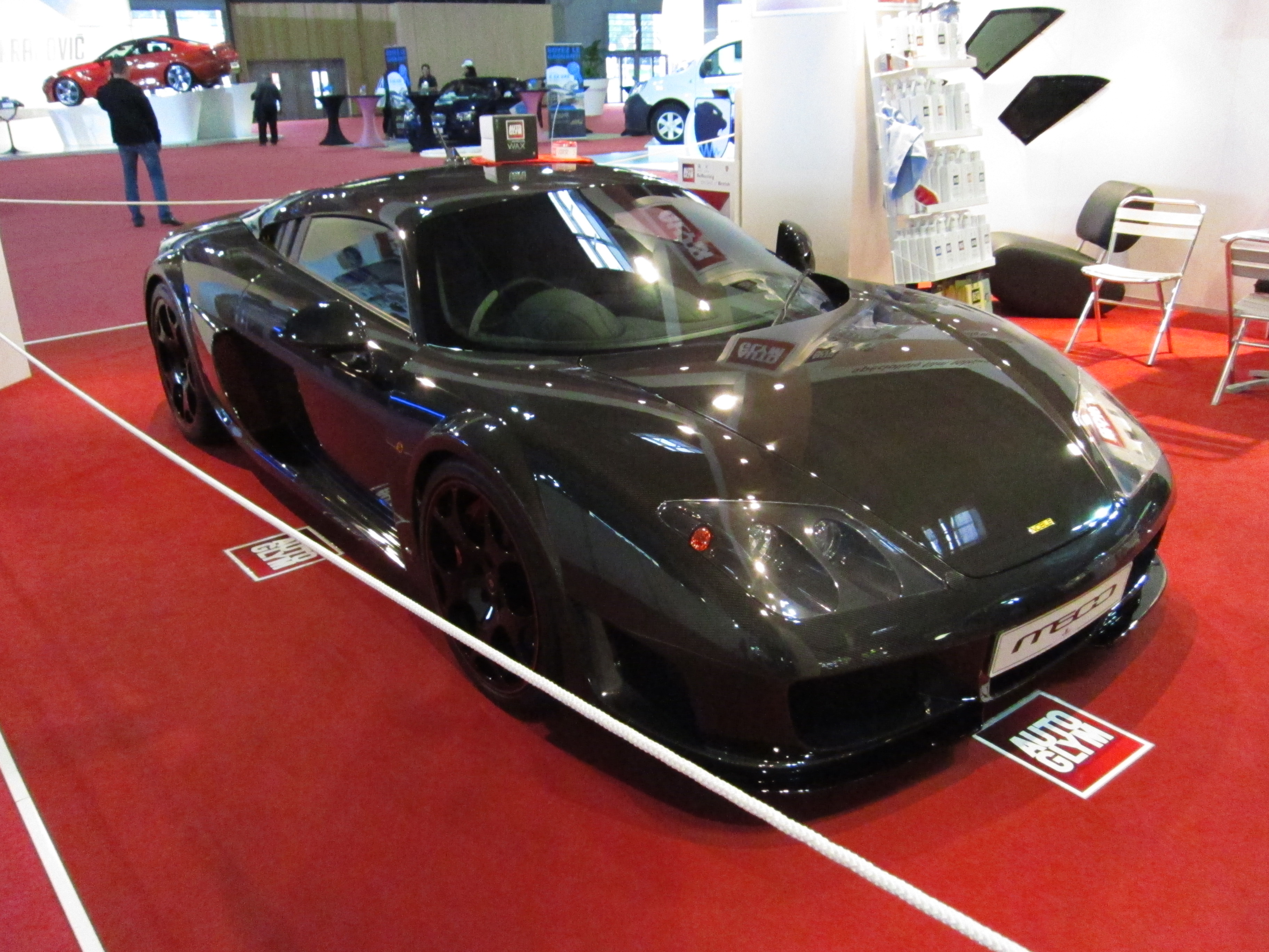 Mondial de l'Automobile Paris 2012